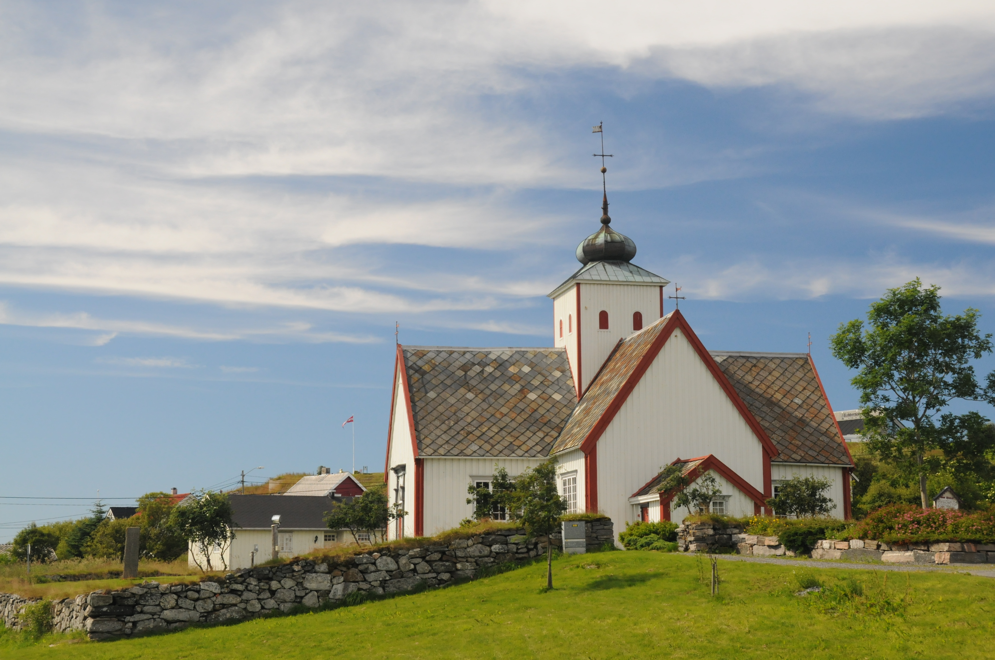 Bud kyrkje